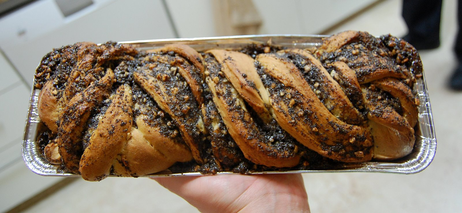 עוגת קראנץ